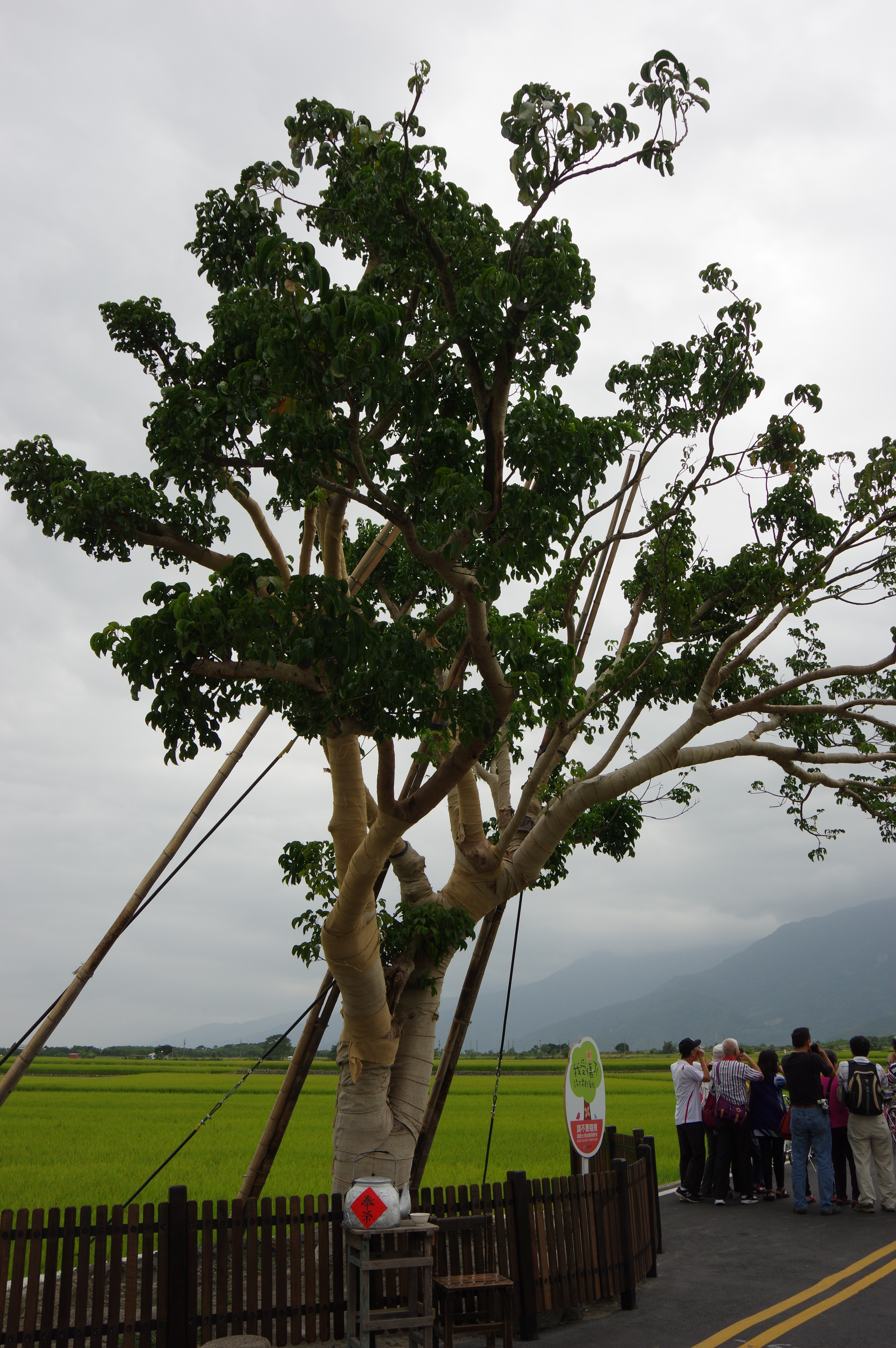 被麥德姆颱風吹倒後，重新種植的台東縣池上鄉金城武樹。